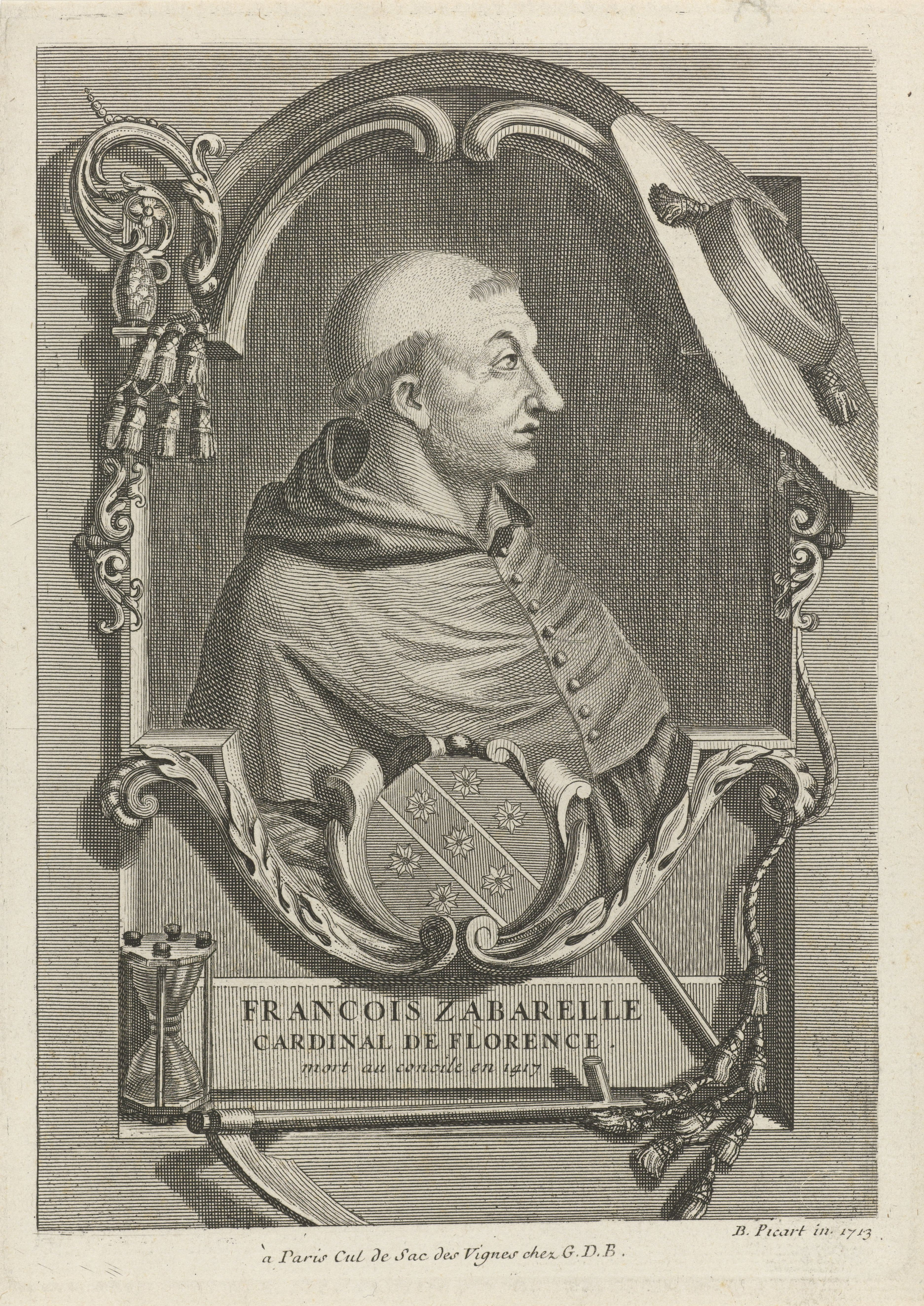 IdentificatieTitel(s): Portret van Francesco ZabarellaObjecttype: prent Objectnummer: RP-P-1909-4547Opschriften / Merken: verzamelaarsmerk, verso, gestempeld: Lugt 2228Omschrijving: Portret van de Italiaanse kardinaal Francesco Zabarella. Onder de omlijsting een zandloper en zeis die verwijzen naar de dood.VervaardigingVervaardiger: naar ontwerp van: Bernard Picart (vermeld op object)prentmaker: anoniemnaar prent van: anoniemuitgever: Monogrammist GDB (vermeld op object)Plaats vervaardiging: naar ontwerp van: Amsterdamuitgever: ParijsDatering: 1713 - 1763Fysieke kenmerken: ets en gravureMateriaal: papier Techniek: etsen / graveren (drukprocedé)Afmetingen: plaatrand: h 205 mm × b 145 mmOnderwerpWat: cardinalinsignia of cardinal, e.g. hat, mantlesymbols of DeathWie: Francesco ZabarellaVerwerving en rechtenVerwerving: aankoop 1905Copyright: Publiek domein